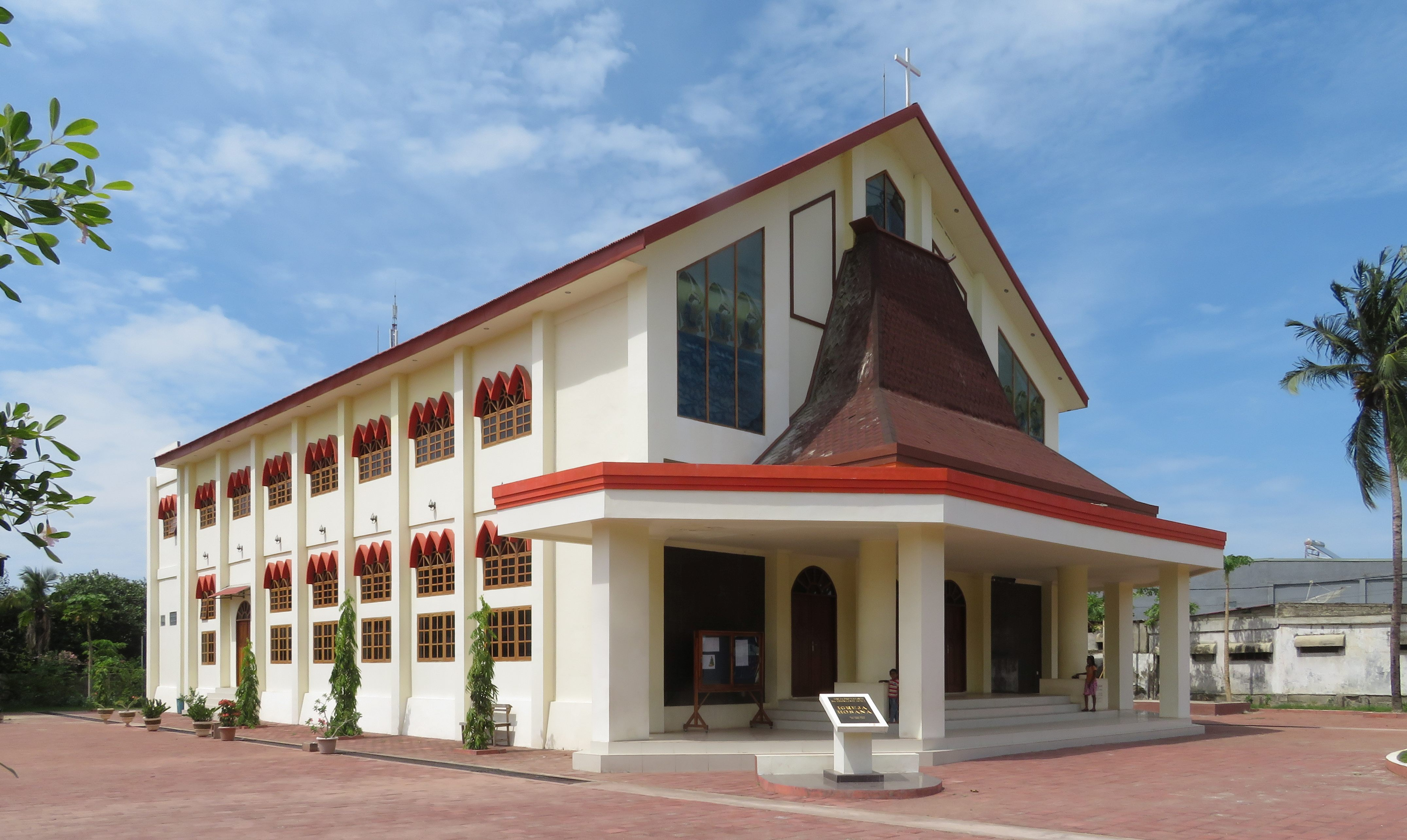 Evangelische Kirche "Igreja Hosana", Motael (bis 2015 Vila Verde), Dili, Osttimor